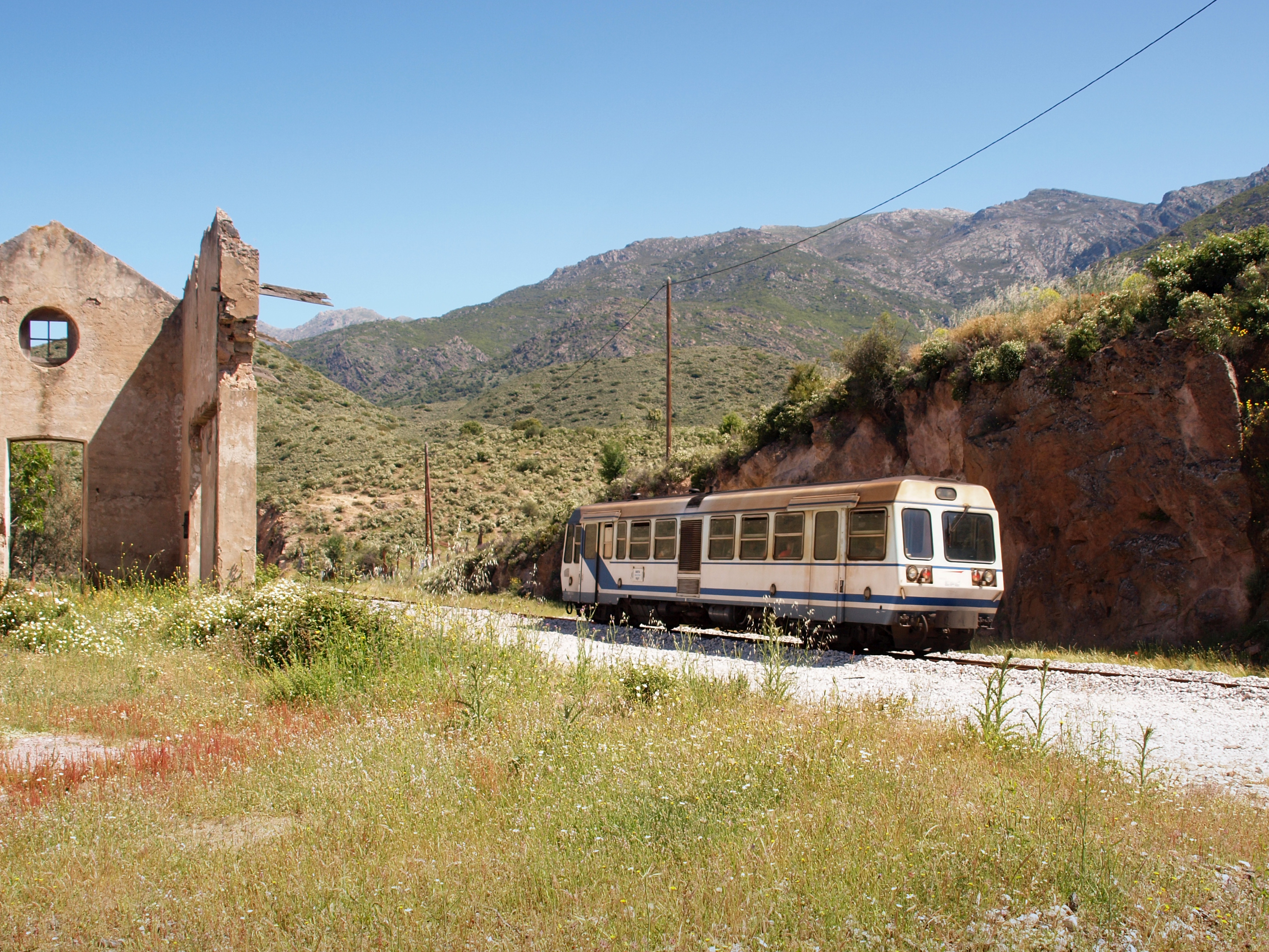 Pietralba, Paesi d'Ostriconi (Corse) - Ancien bâtiment de la gare désaffectée de Pietralba